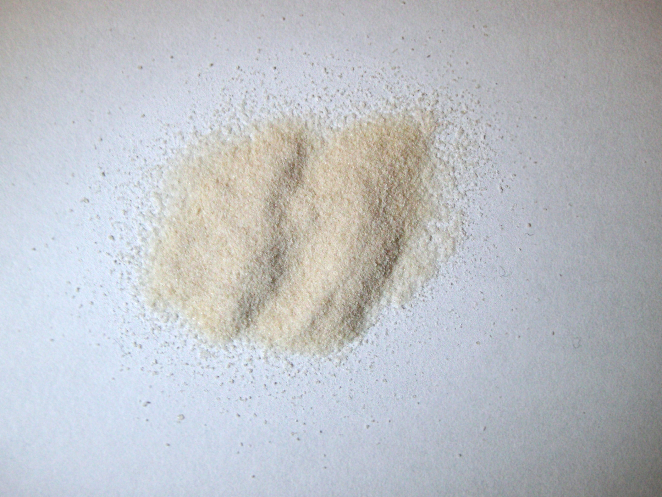 Poudre d'agar-agar